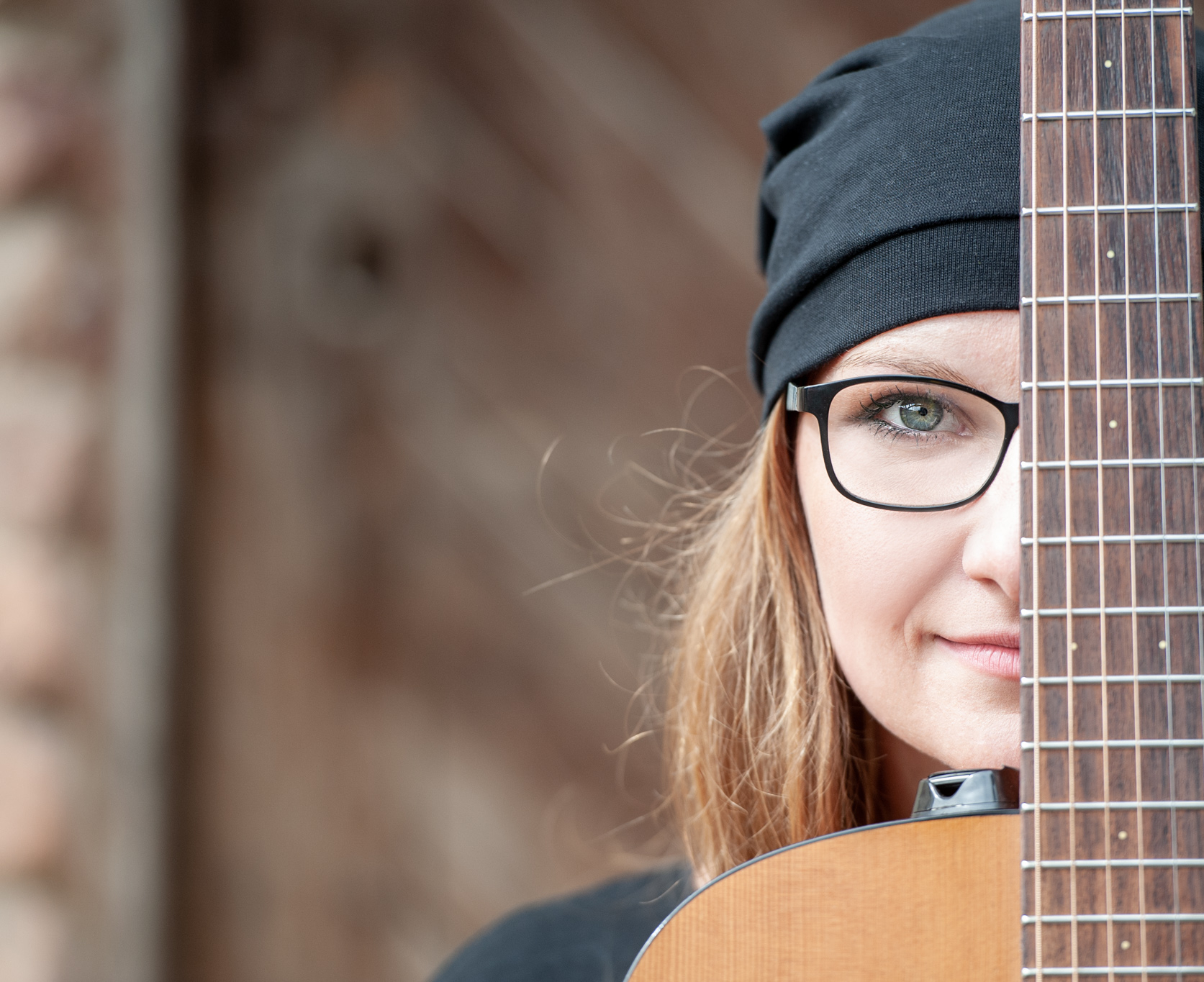 Fotografie textařky hudební skupiny GOOD WORK